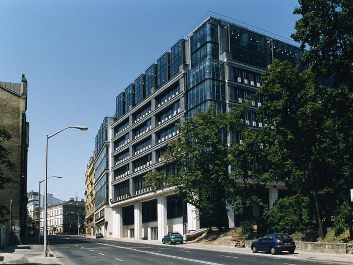 Centrum Giełdowe w Warszawie